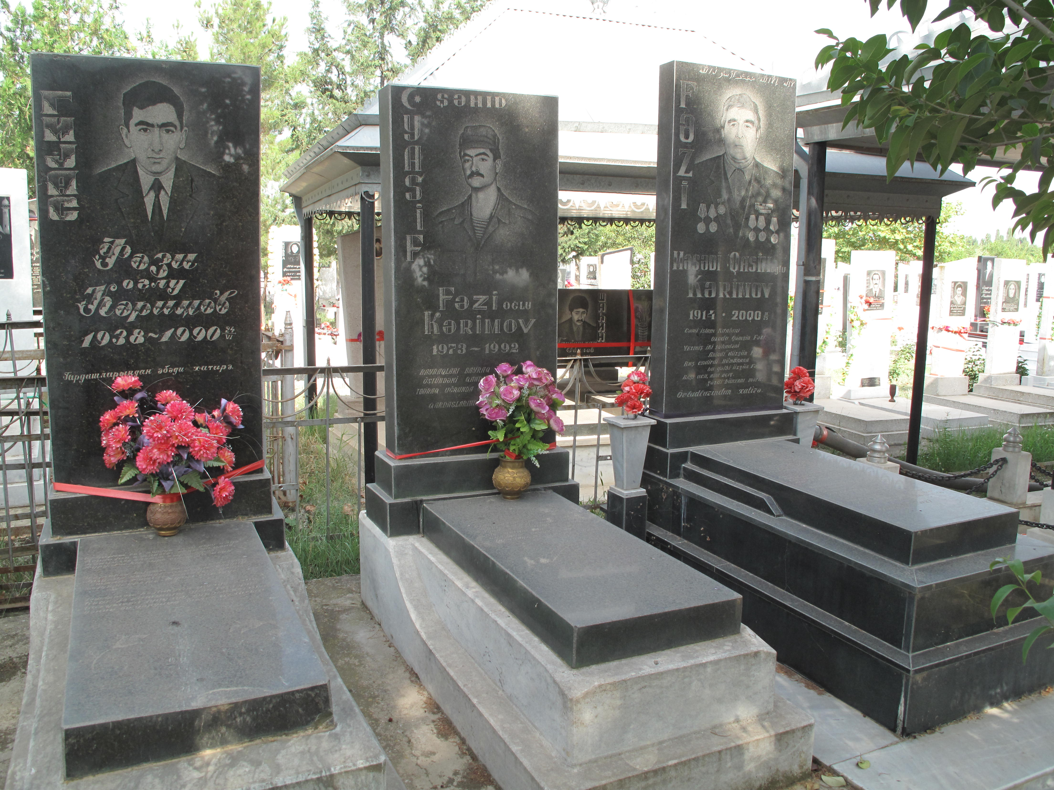 Yeni Daşkənd kənd qəbiristanlığından görünüş